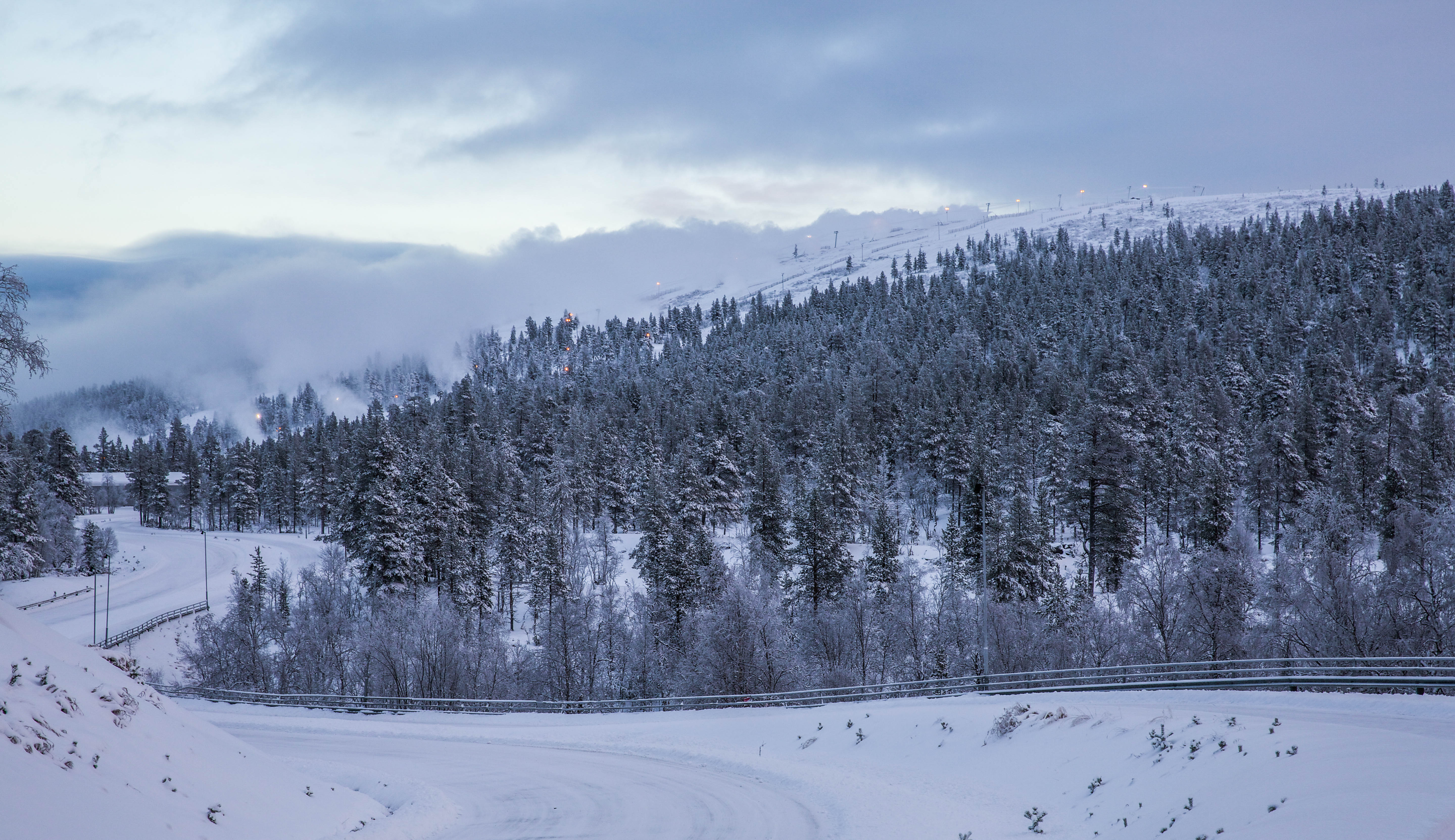 Saariselkä, Lapland, Finland